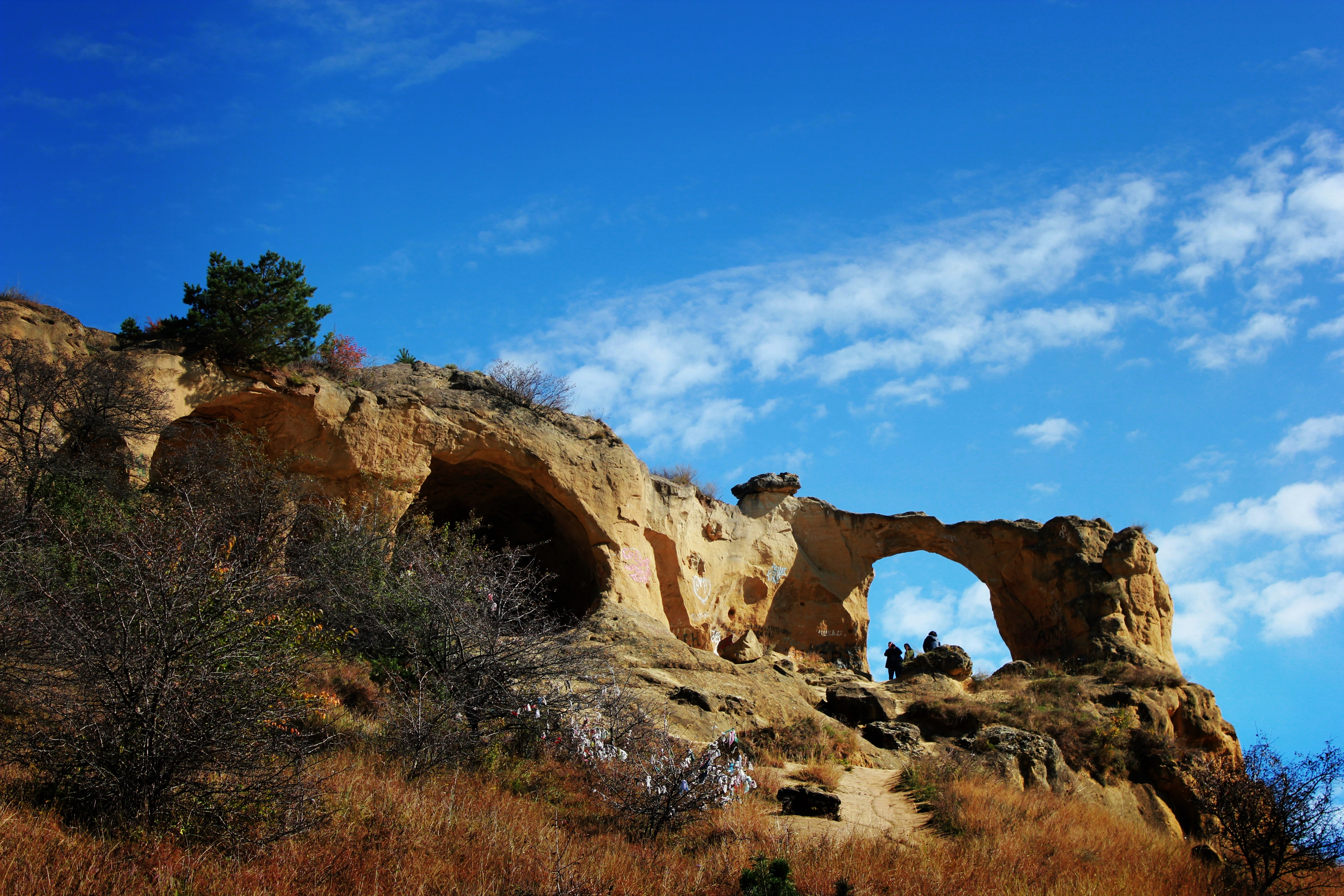 Гора Кольцо, Кисловодск This image is related to the protected area of Russia number 2610067